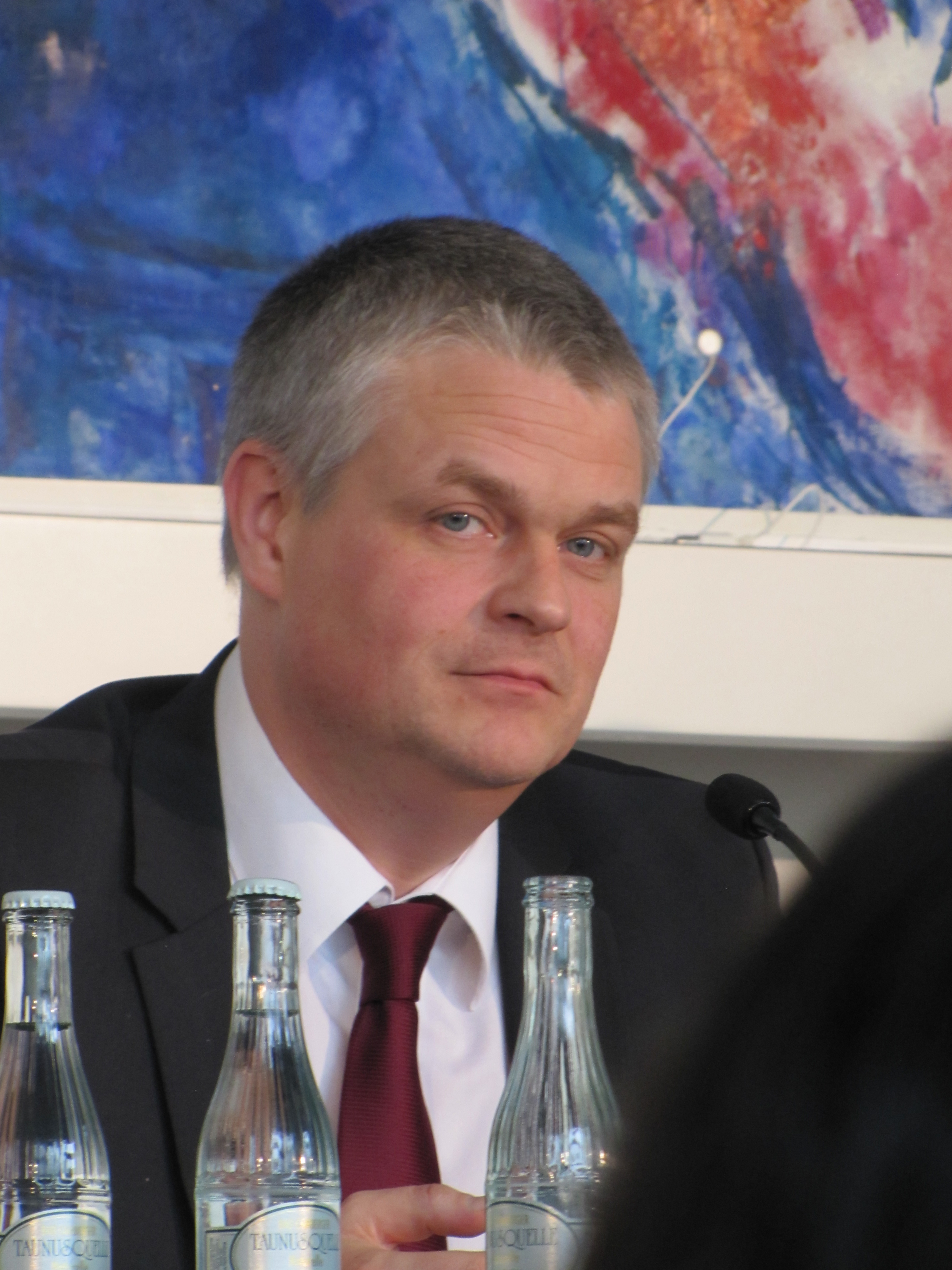 Dirk Pilz, bei den 45. Römerberggesprächen, Thema:Was soll das Theater?, im Oktober 2017 im Chagall-Saal der Städtischen Bühnen in Frankfurt am Main.